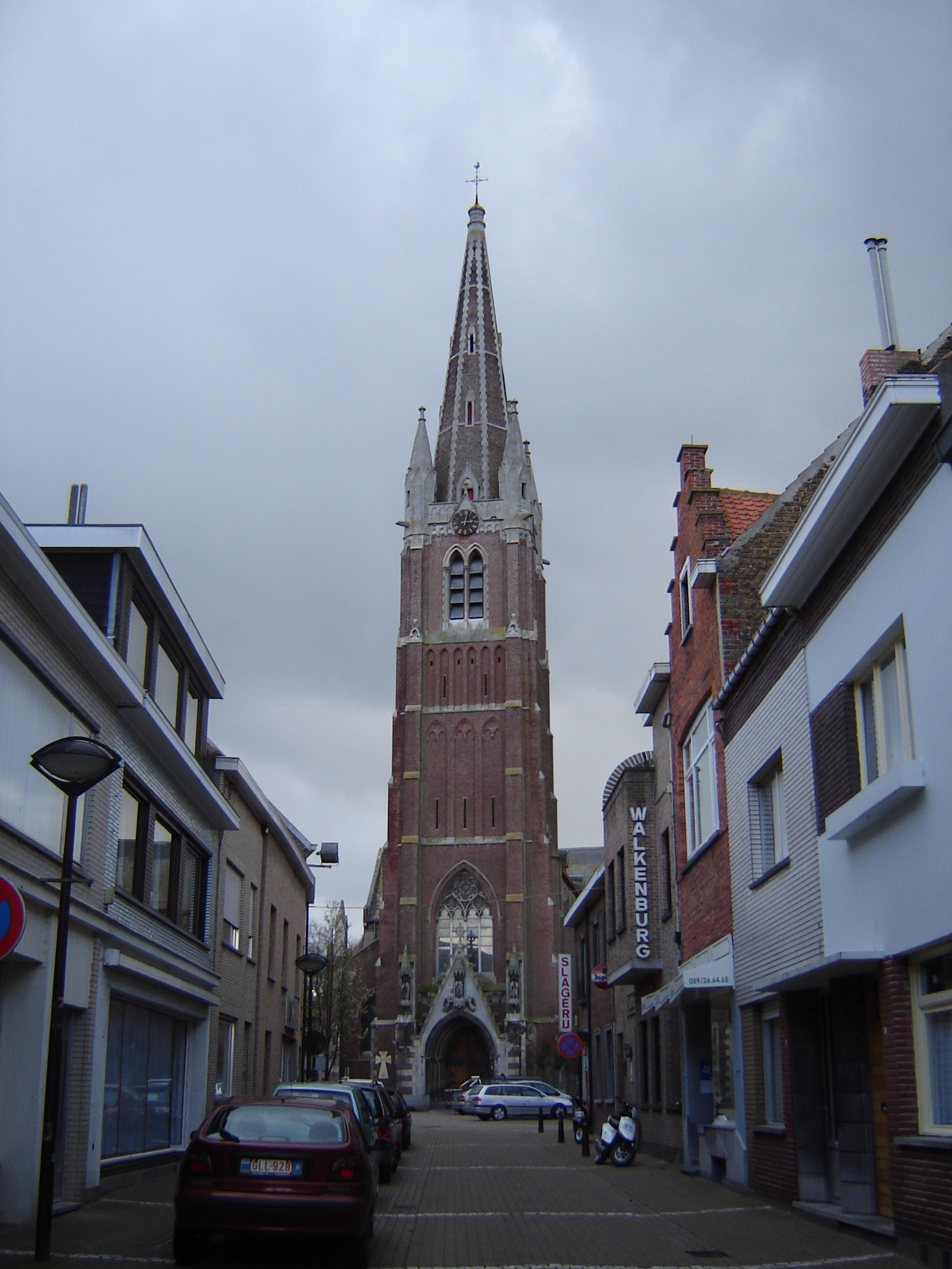 Onze-Lieve-Vrouwekerk aan de Mariastraat in OudenburgChurch of Our Layd on the Mariastraat street in Oudenburg, West Flanders, Belgium